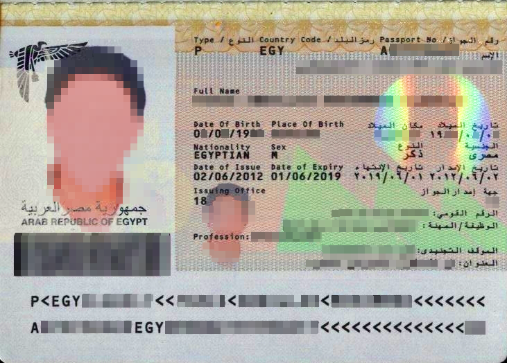 الصفحة الاولى من الجواز السفر المصري